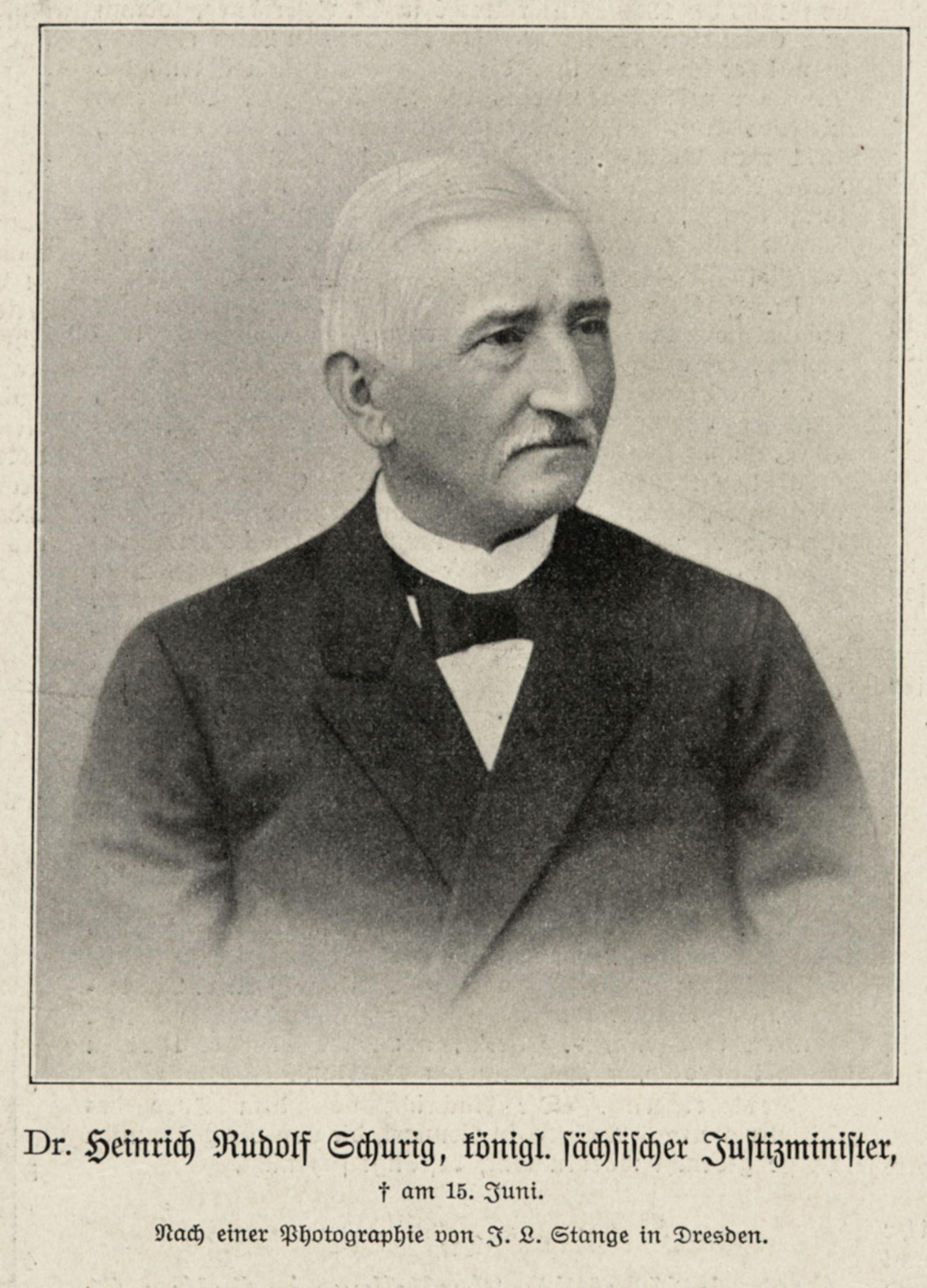 Schurig, Heinrich Rudolf. Kgl. Sächsischer Justizminister, Vorsitzender des Gesamtministeriums Hornjoserbsce: Schurig, Heinrich Rudolf. Kral. Sakski justicny minister, předsyda cyłkowneho ministerstwa